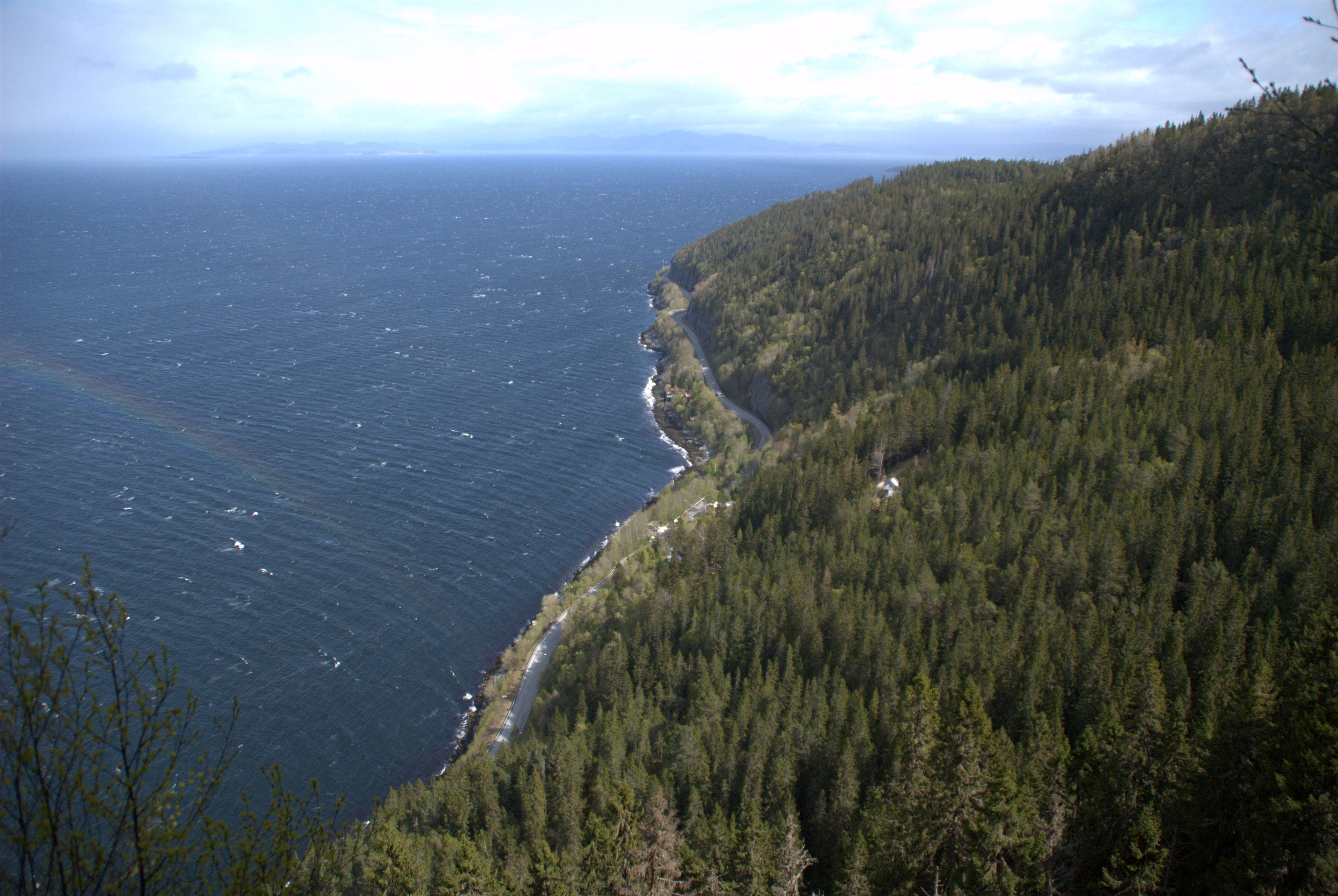 Fylkesvei 715 (Bynesveien) og Trondheimsfjorden sett fra St. Olavsspranget i nordre del av Bymarka i Trondheim, Sør-Trøndelag.